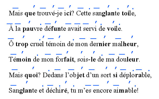 Déclamation baroque de la tragédie Les Amours tragiques de Pyrame et Thisbé (1621) par Théophile de Viau